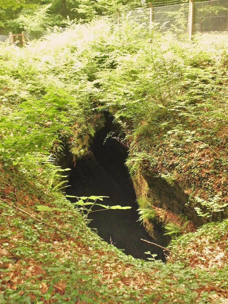 Deckeneinsturz an der Blauen Grotte der Einhornhöhle bei Scharzfeld am Harz. Der Einsturz ist weiträumig abgesperrt, ein direkter Zugang verschlossen.